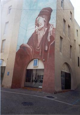 Het tegenwoordige centrum van Salon-de-Provence. Eigen foto